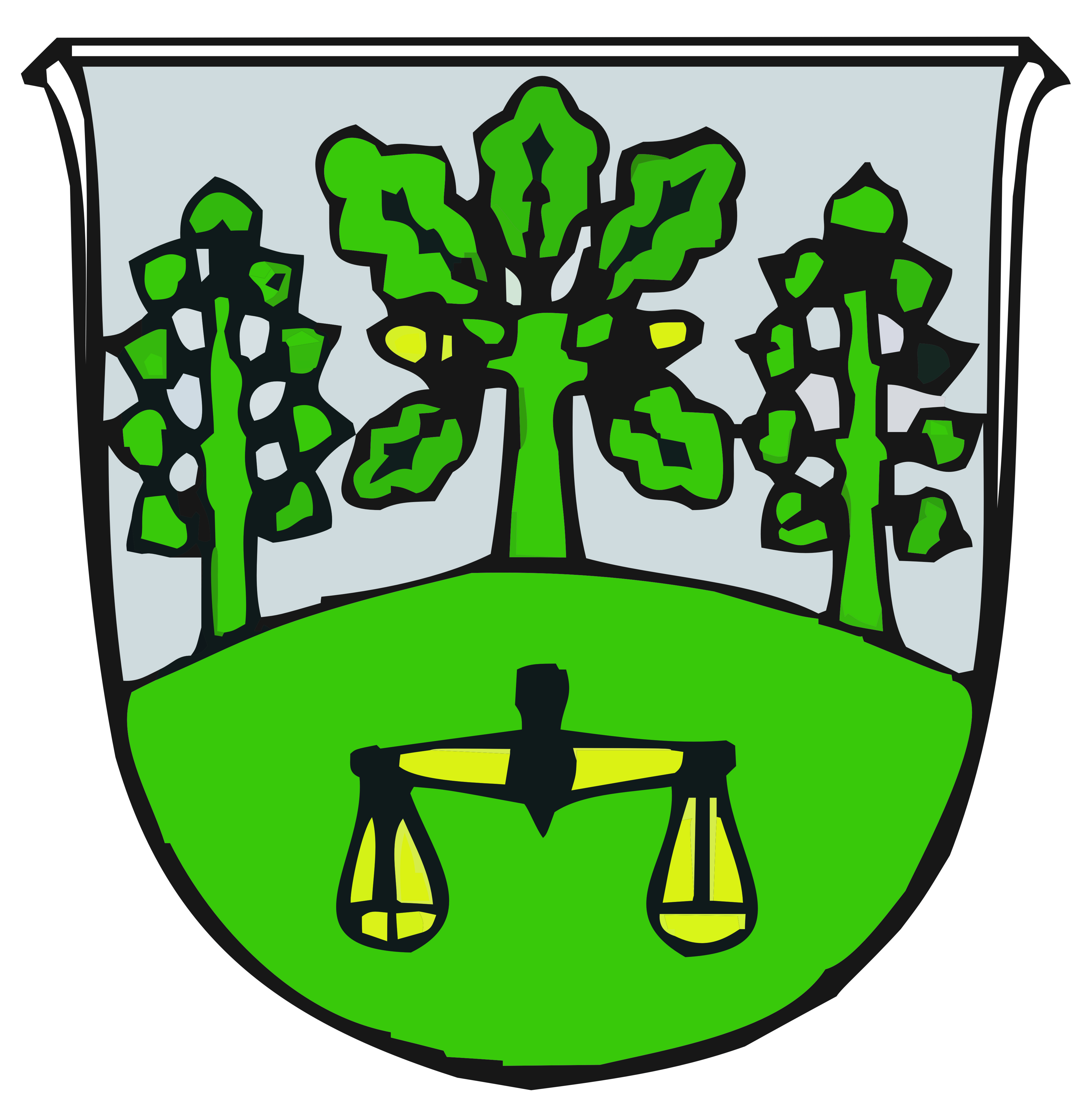 Wappen der Gemeinde Hüttenberg Das Wappen zeigt einen Berg mit Bäumen und die Waage als Zeichen der Gerichtsbarkeit und verweist auf den bewaldeten Höhenrücken, auf dem im Mittelalter Gerichtsversammlungen abgehalten worden sein sollen